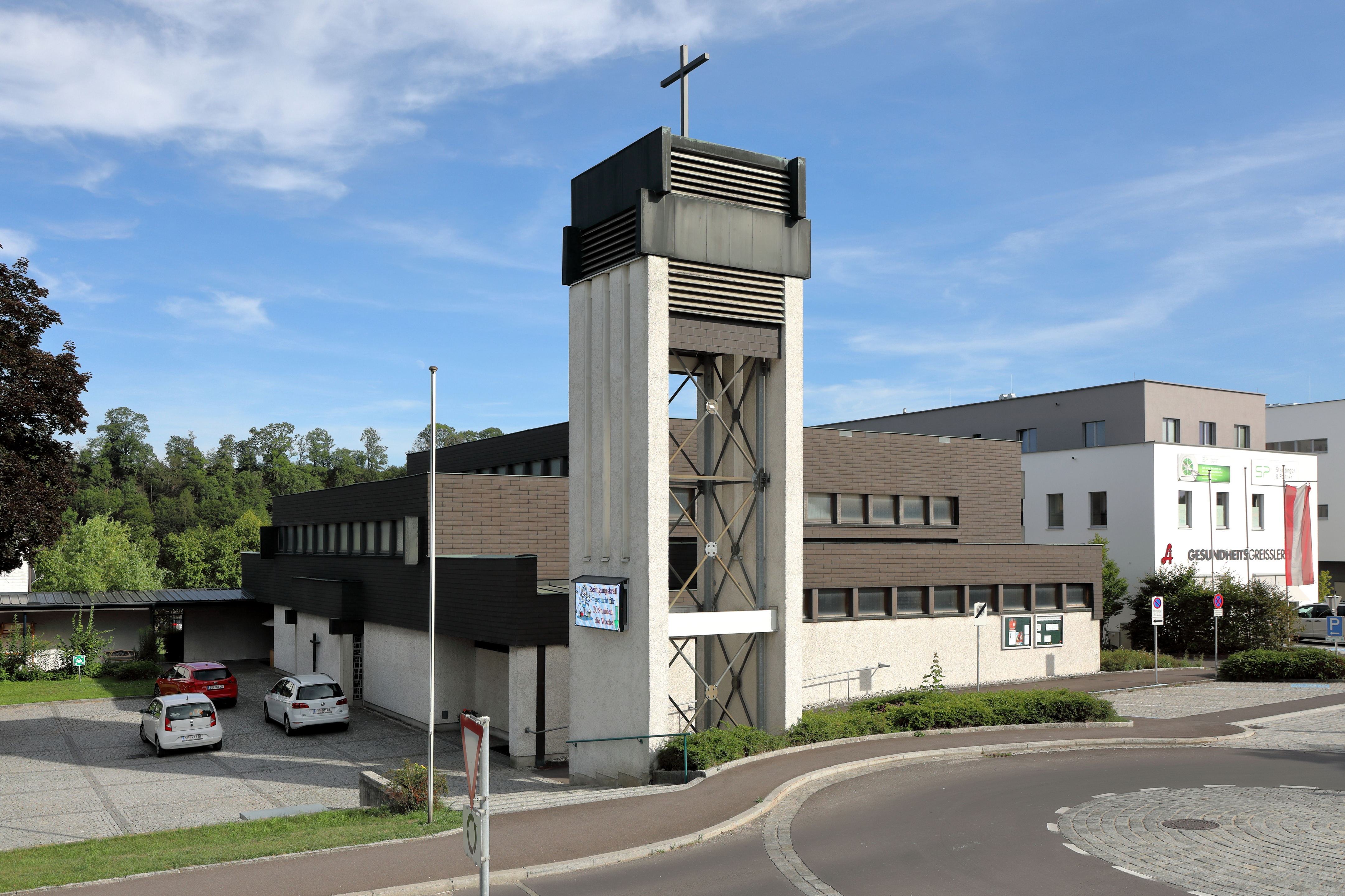 Nordwestansicht der röm.-kath. Pfarrkirche hl. Berthold in Neuzeug, ein Ortsteil der oberösterreichischen Marktgemeinde Sierning.Der Spatenstich für die nach Plänen von Gottfried Nobl und Othmar Kainz errichtete Pfarrkirche erfolgte am 17. August 1969 und am 24. Oktober 1971 wurde die Kirche durch Bischof Franz Zauner feierlich geweiht. 1992 wurde im Zuge der Anschaffung von drei neuen Glocken bei der Glockengießerei Grassmayr der Kirchturm um rd. 6 Meter erhöht.